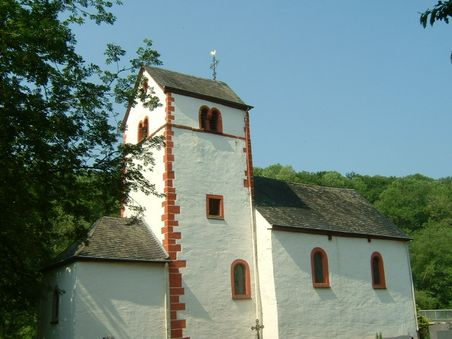 Kirche St. Johannes der Täufer in Gentingen in der Eifel. Romanischer Turm und Kern, 1696 und 1710 erneuert.